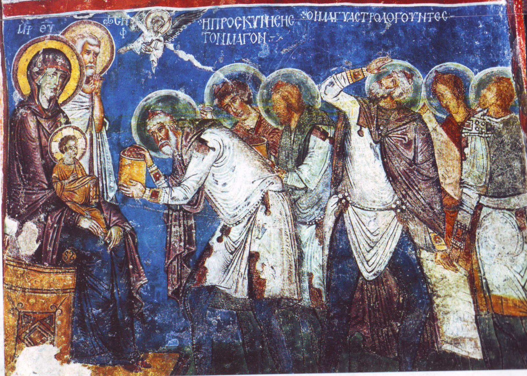 The magi. Fresco in Cappadocia